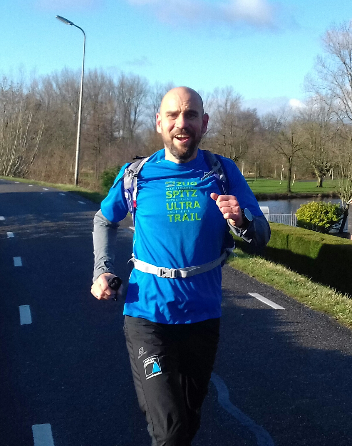 Pascal van Norden tijdens trainingsrondje op de Goejanverwelledijk te Gouda